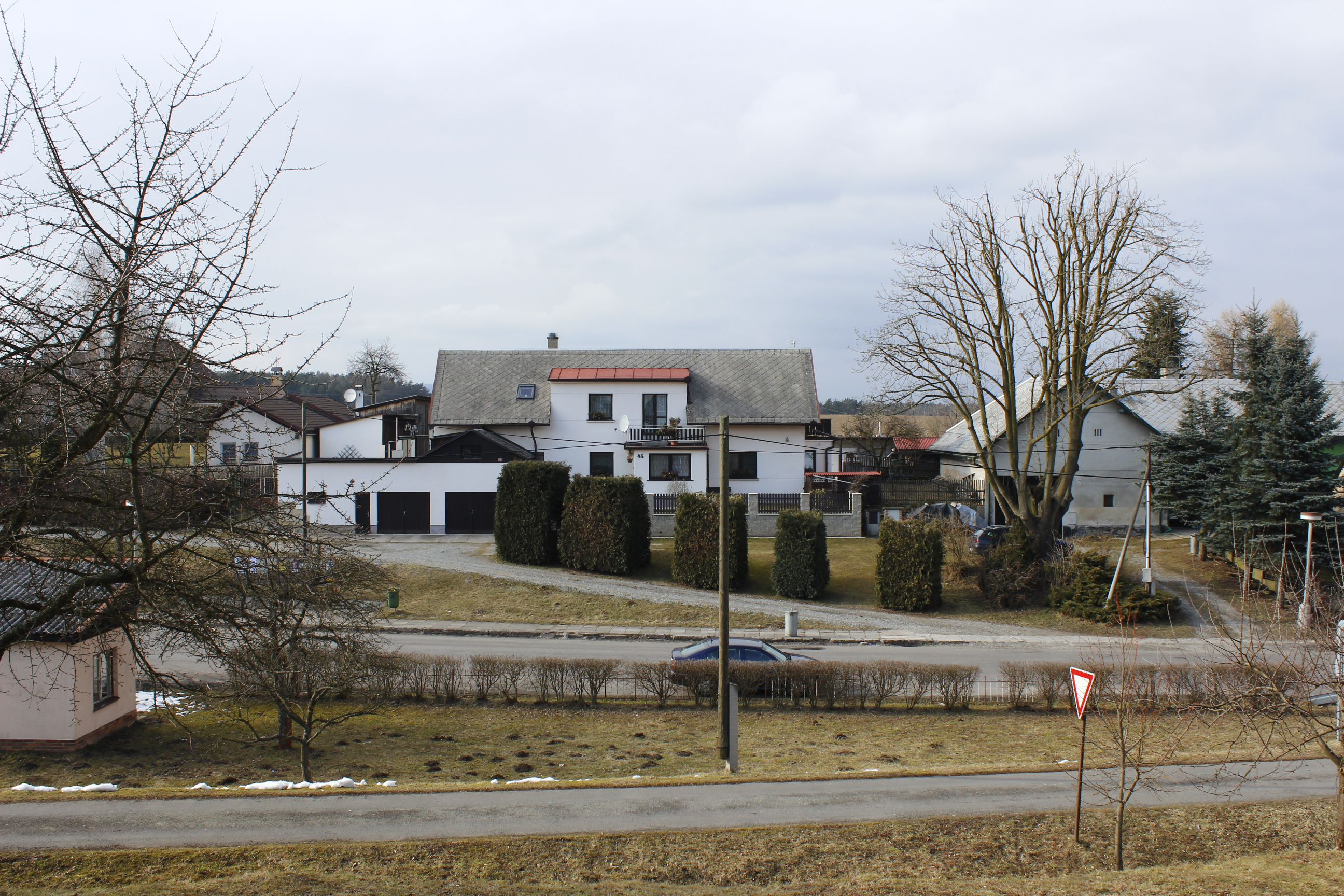 Dům číslo popisné 45 v Plužné.